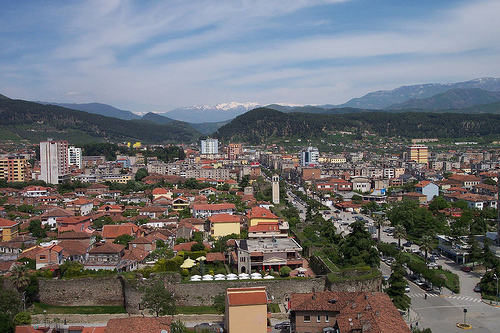 Elbasan